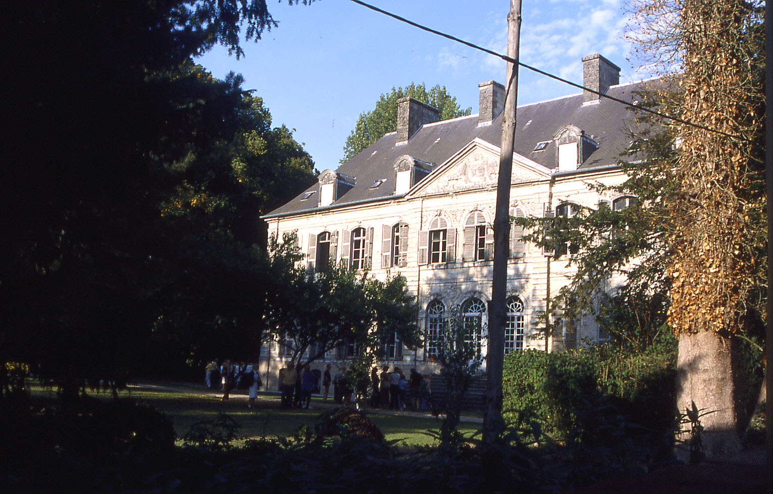 Le château de couin